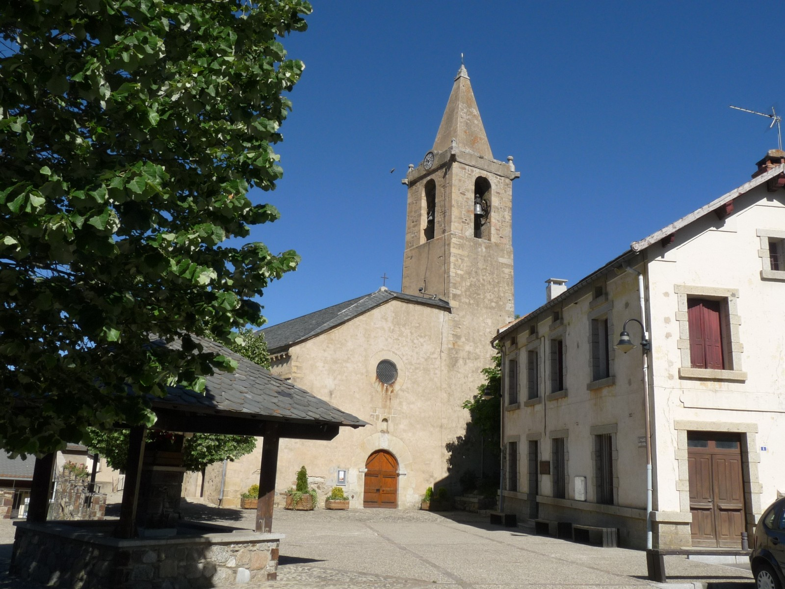 Eglise de Saillagouse, Pyrénées-Orientales, France